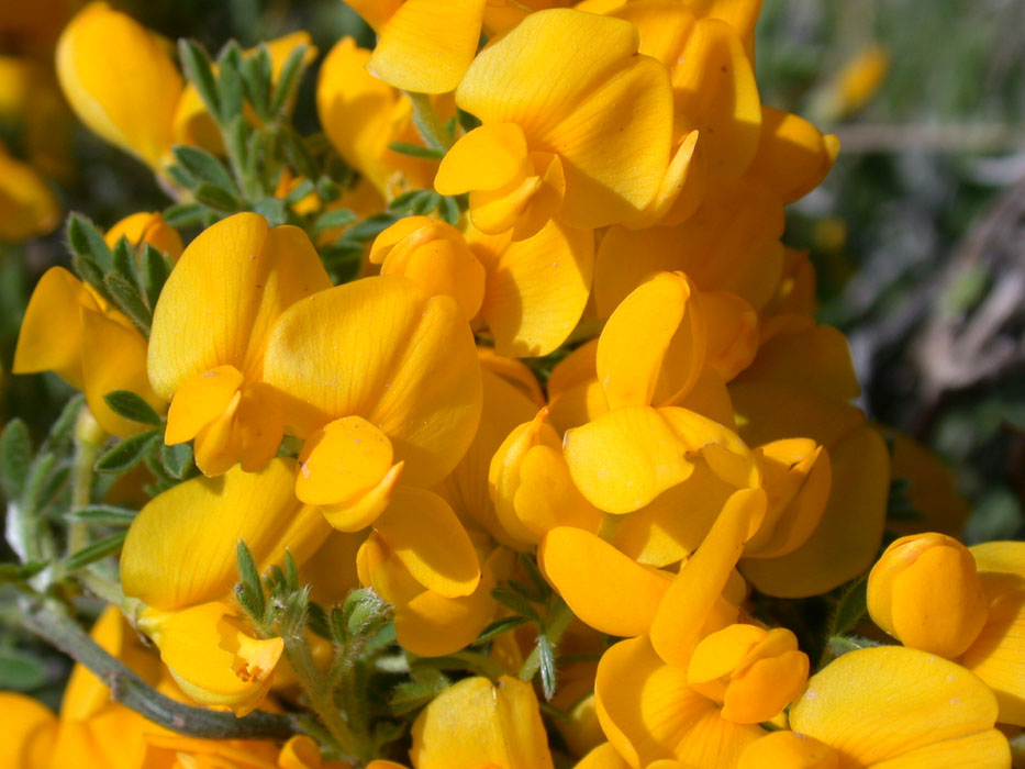 Cytisus ardoini